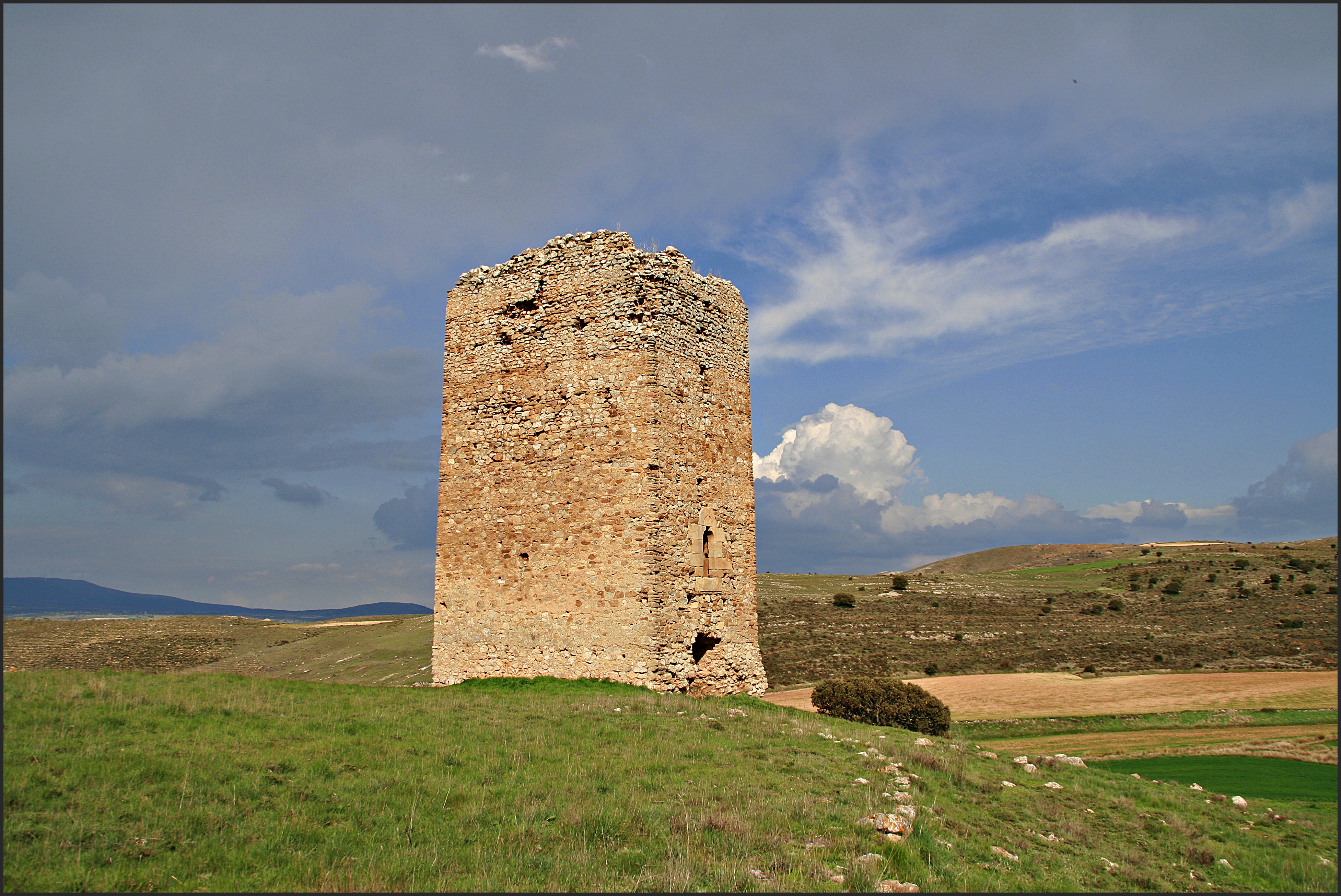 La torre de La Pica en alza sobre una suave colina en el despoblado del mismo nombre, en el término municipal de Tajahuerce, comarca de Campo de Gomara, provincia de Soria. Se tiene noticias de que en el siglo XI, en tiempos del general Galib, el conde Garci Fernández, rompiendo las treguas que en ese momento se estaban negociando en Córdoba y aprovechando la ausencia de Galib de la zona, inicia una expedición junto a las mesnadas de los Infantes de Lara contra las torres del valle del Rituerto y Gómara, Canales (Aldealpozo), La Pica, Masegoso y Torre de Amril (Torambil). La torre de La Pica es una torre de defensa beberer al estilo de la de Noviercas, del siglo IX-XI.